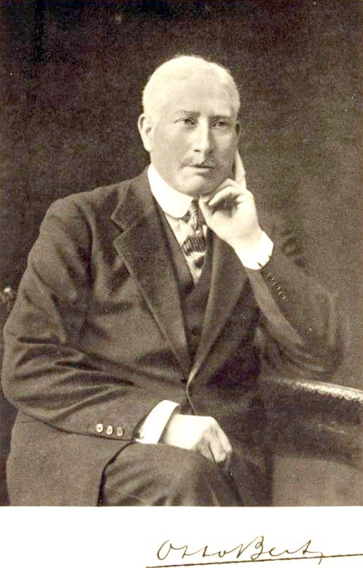 Otto Beit (1865-1930)